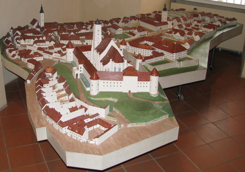 Maketa Kaptola u Muzeju grada Zagreba, rad ing. arh. V. Mišića sa suradnicima, Zagreb, 1997